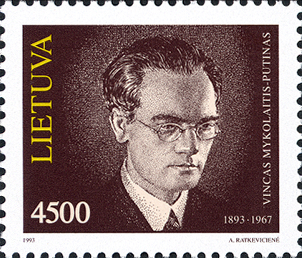 Vincas Mykolaitis-Putinas